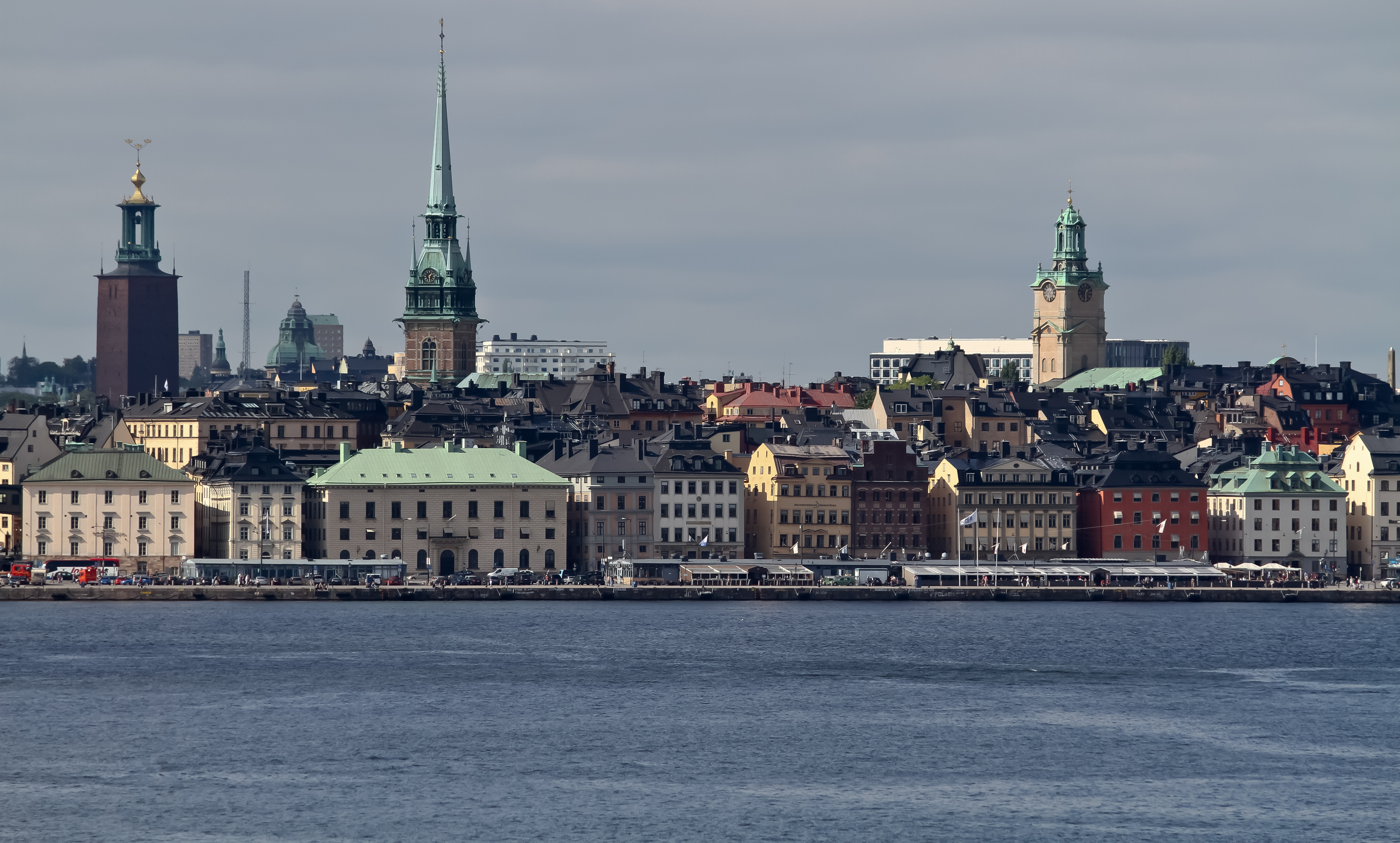 Stockholm